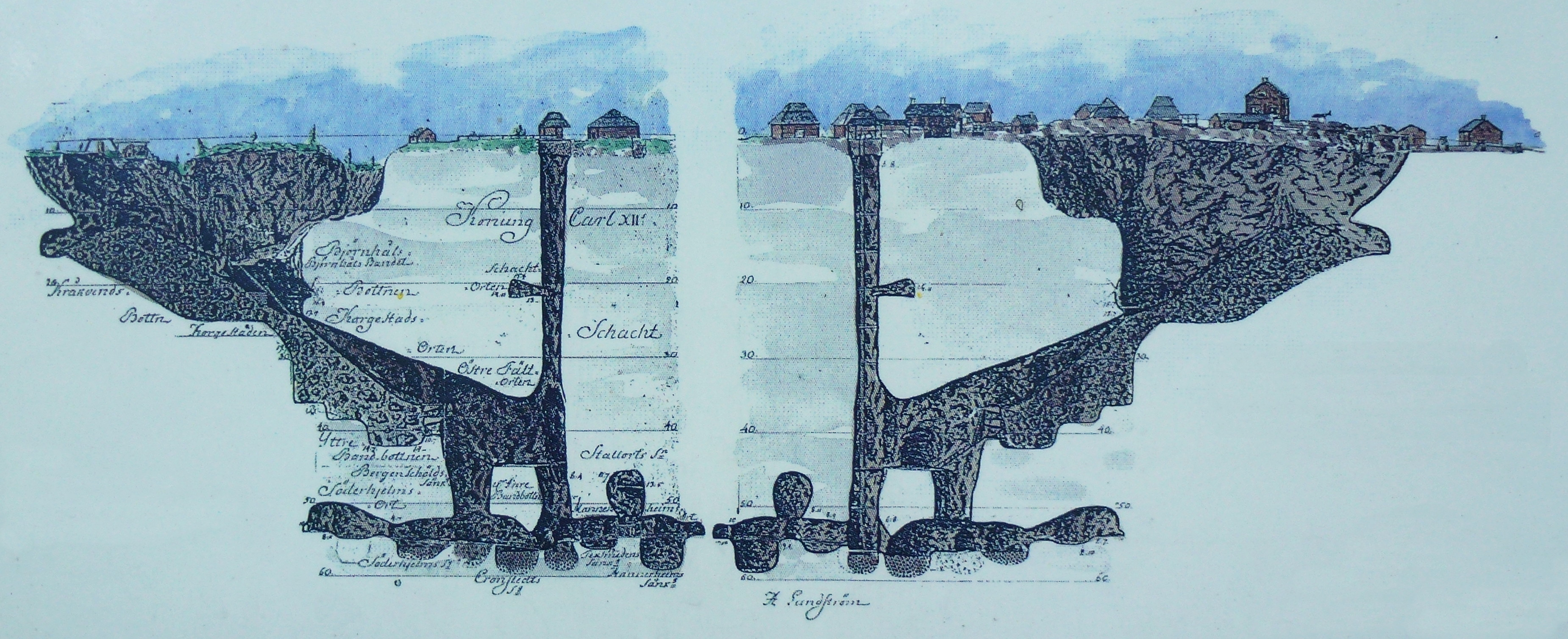 Bispbergs gruva med Karl XI:s schakt, sett från två olika håll